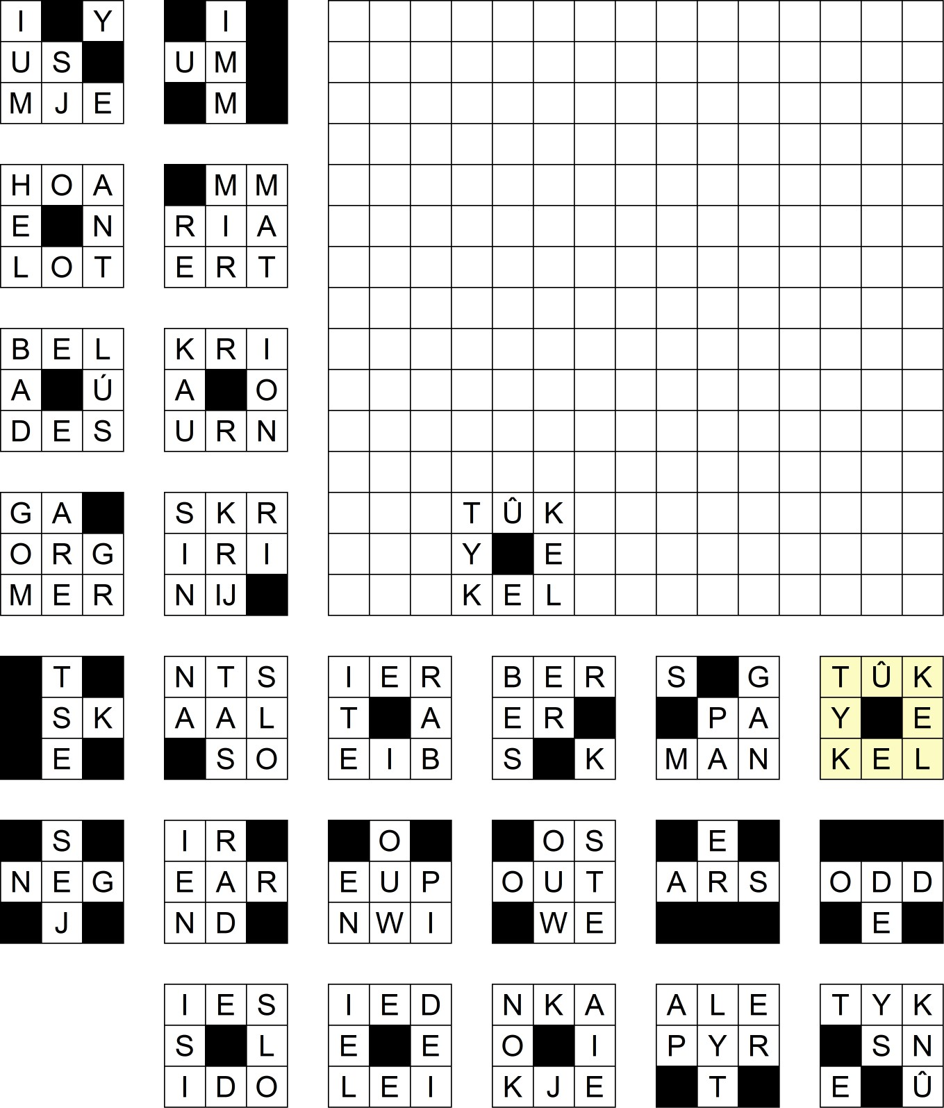 Blokpuzzel waarin reeds een blokje is ingevuld